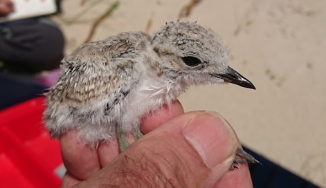 Pollo de Chorlitejo Patinegro (Charadrius alexandrinus), recolectado en las costas de Galicia, España.